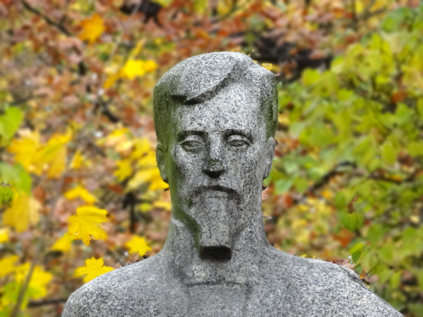 Pomnik Henryka Sienkiewicza w parku im. Jana Kochanowskiego w Bydgoszczy